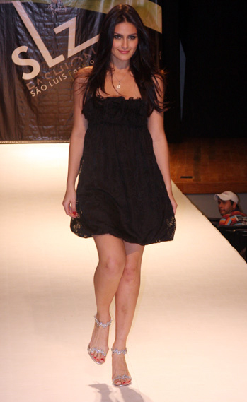 Natália Guimarães na SLZ Fashion.